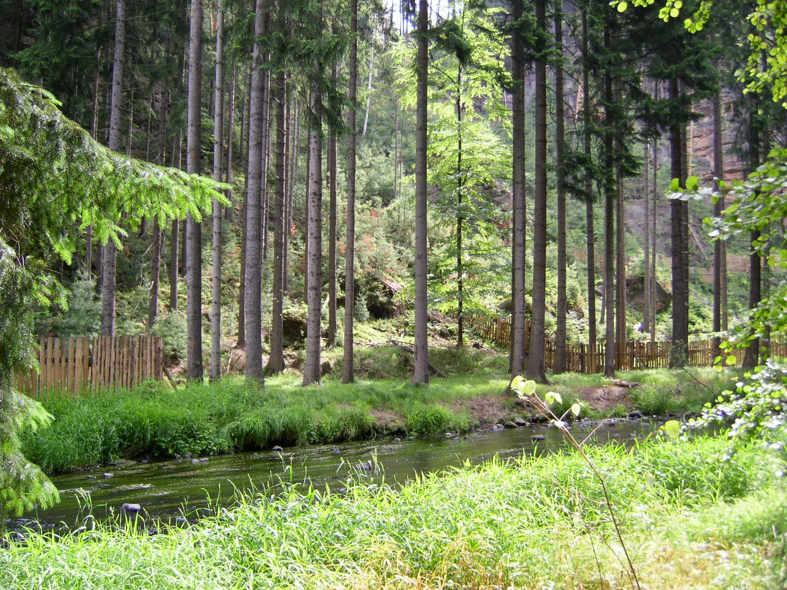 Paulinengrund Böhmische Schweiz von Thomas Schaffhirt.